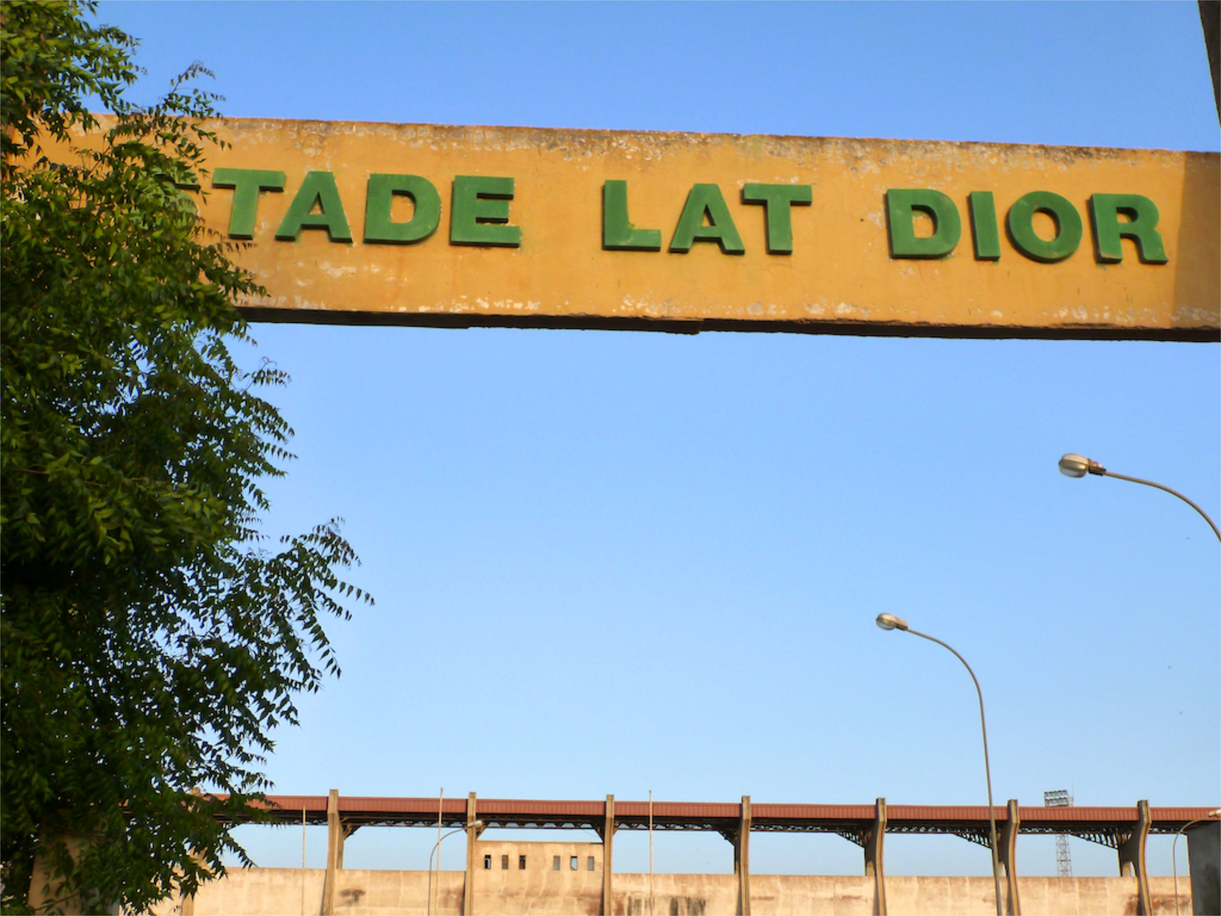 Stade Lat Dior (Thiès, Senegal)